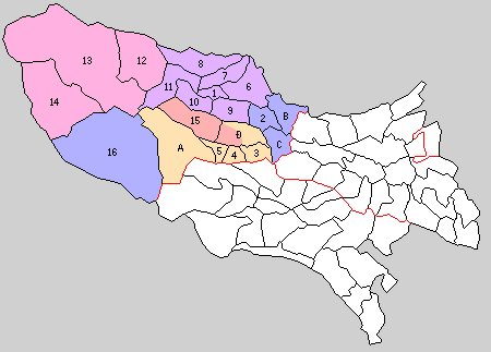 西多摩郡の町村。